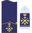 oficial